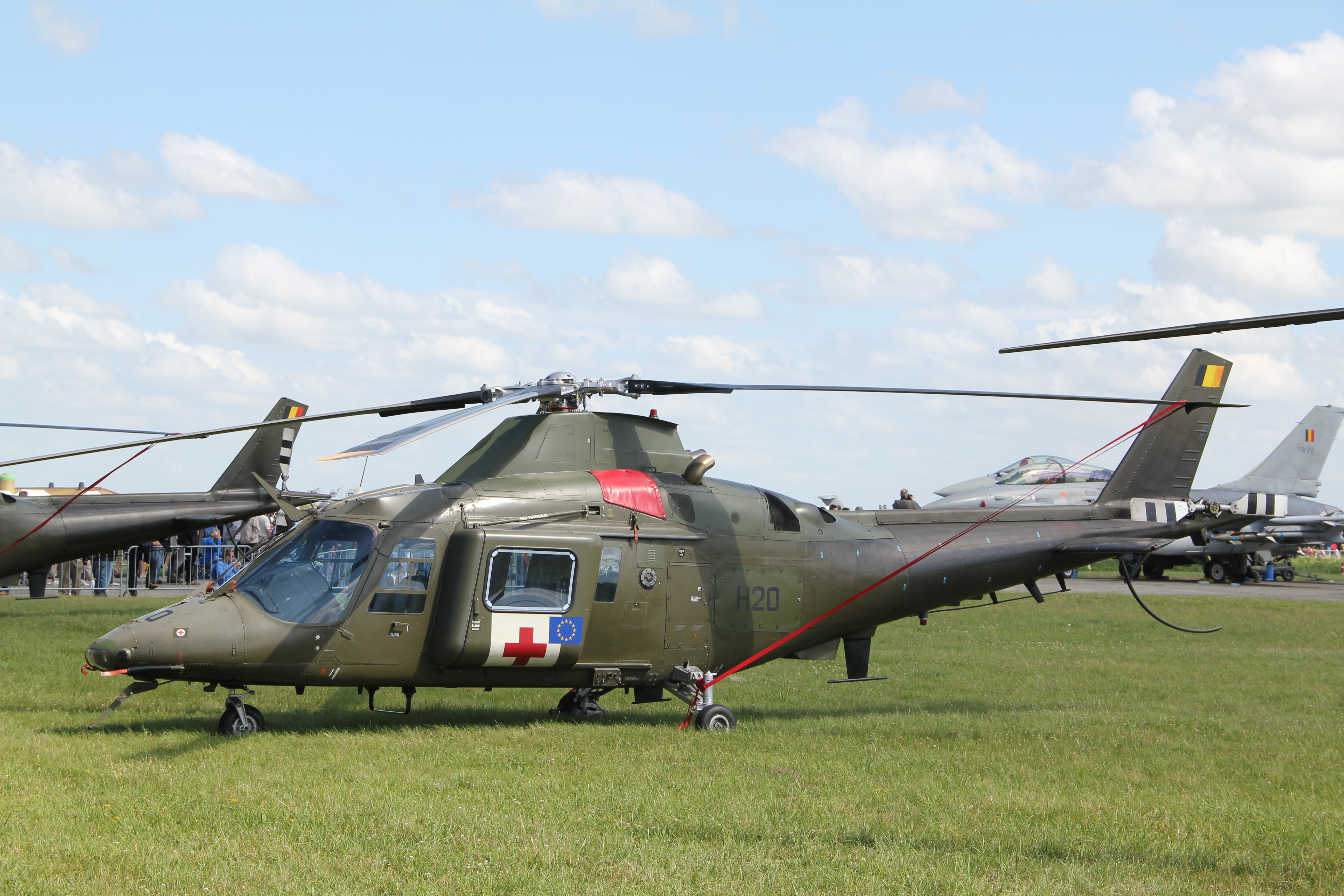 Belgian Air Component Agusta A109.